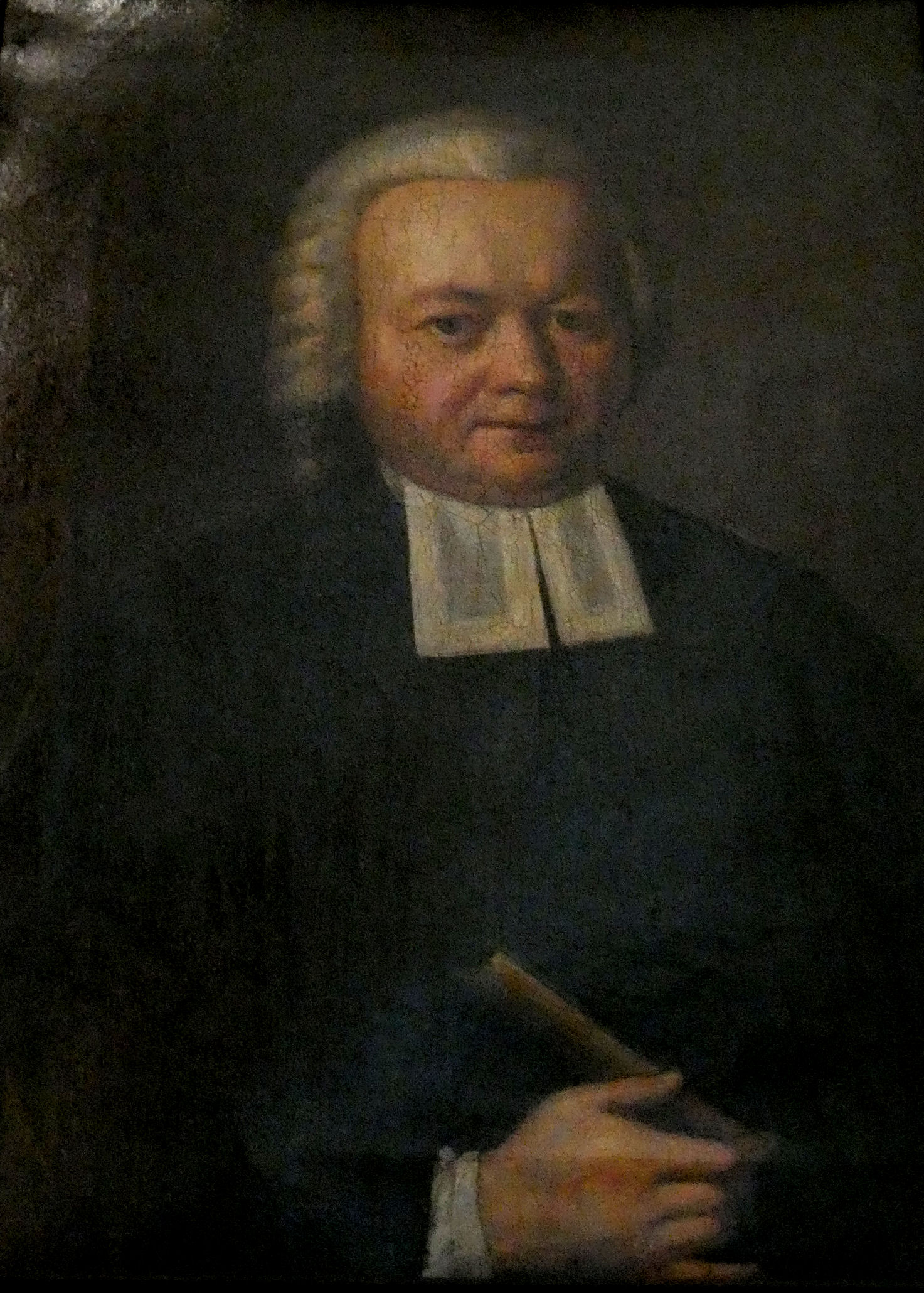 Fotografische Reproduktion (bearb.) eines Porträtgemäldes des Oberpfarrers der Marktkirche Halle Carl Tobias Jetzke